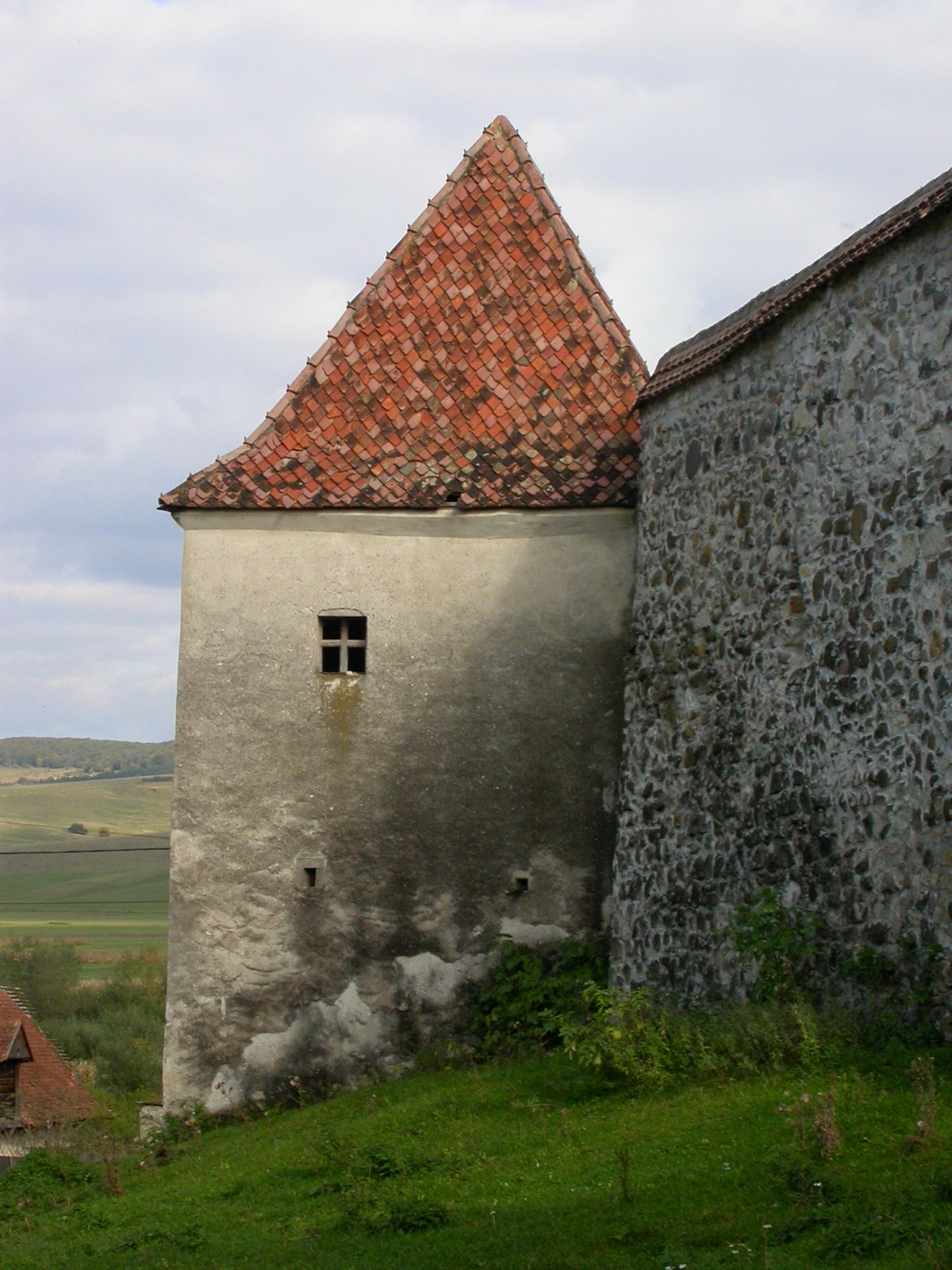 Ansamblul bisericii evanghelice fortificate, sec. XIII-XVII